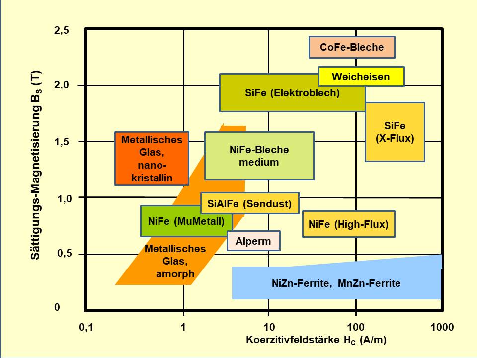 Werkstoffeigenschaften weichmagnetischer Kerne im Vergleich